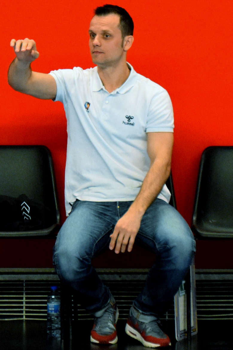 PSG Handball / Toulouse Fenix Handball lors de la 21e journée du championnat de France de handball masculin le 16 avril 2016 au stade Pierre de Coubertin à Paris.